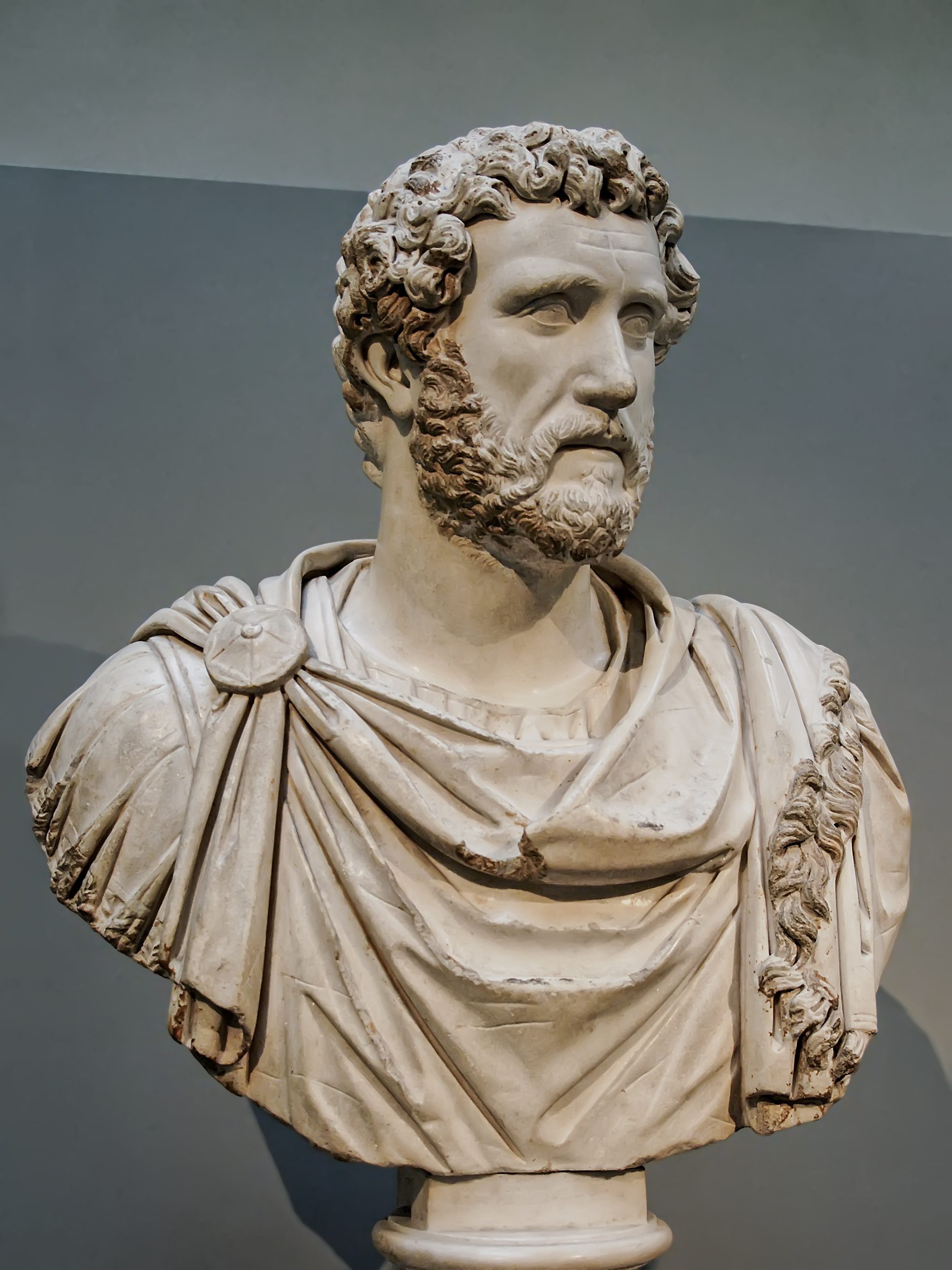 Standardiziran cesarski portret iz hiše Jason Magnus v Cyrene, Severna Afrika (British Museum).